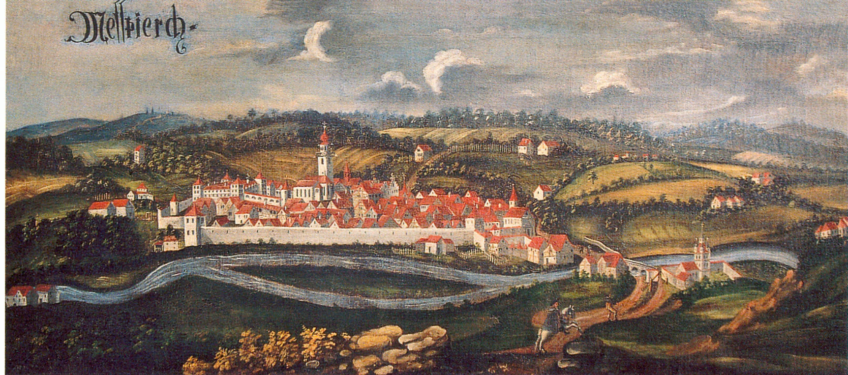 Stadt Meßkirch Ölbild